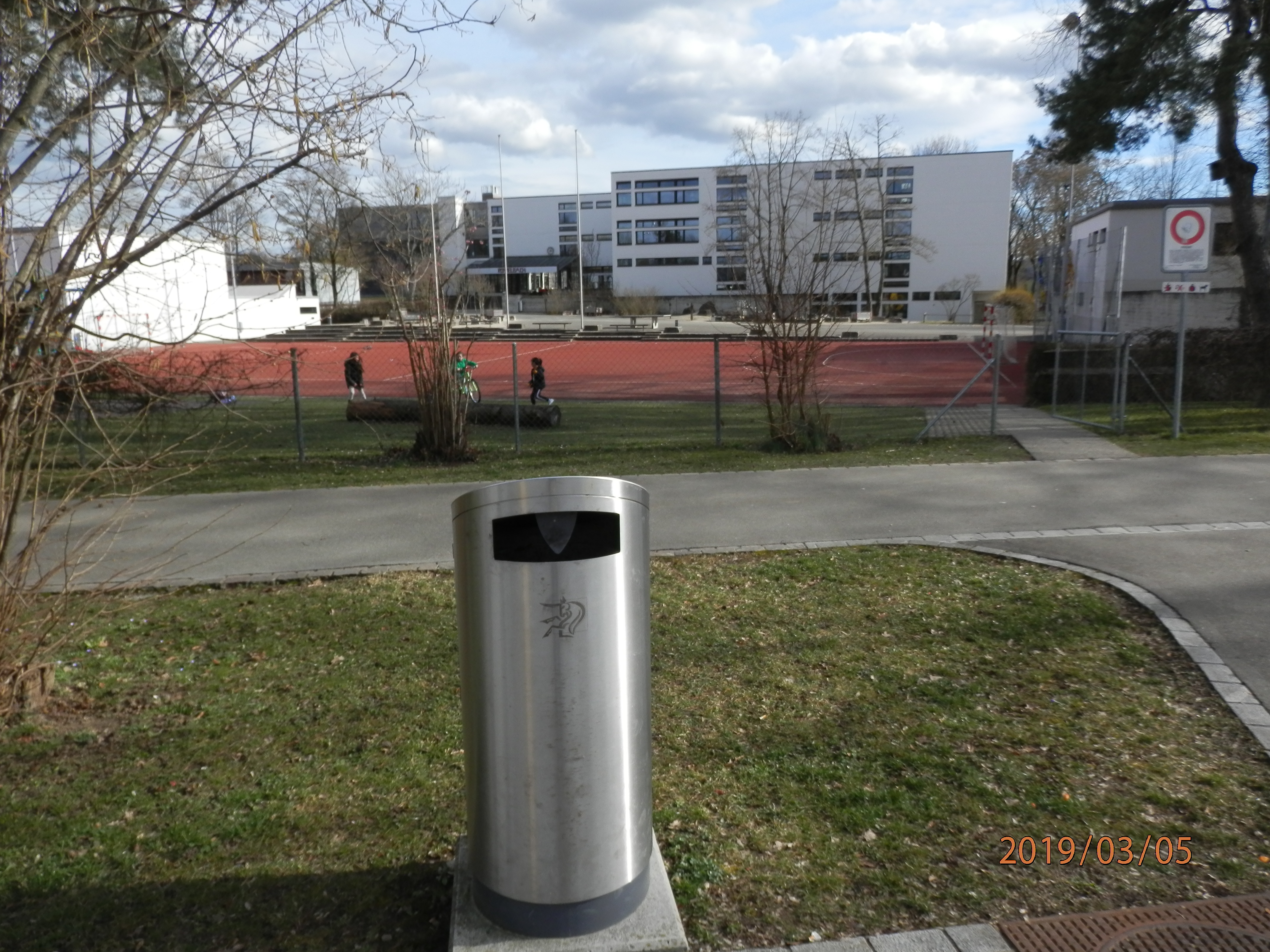 Posée dans sa commune d'origine, l poubelle requin porte les armoiries de Rumlang.